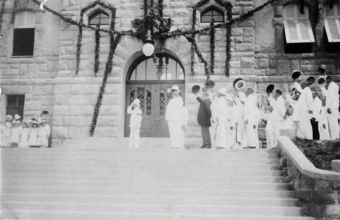 青岛督署学校新教学楼落成典礼